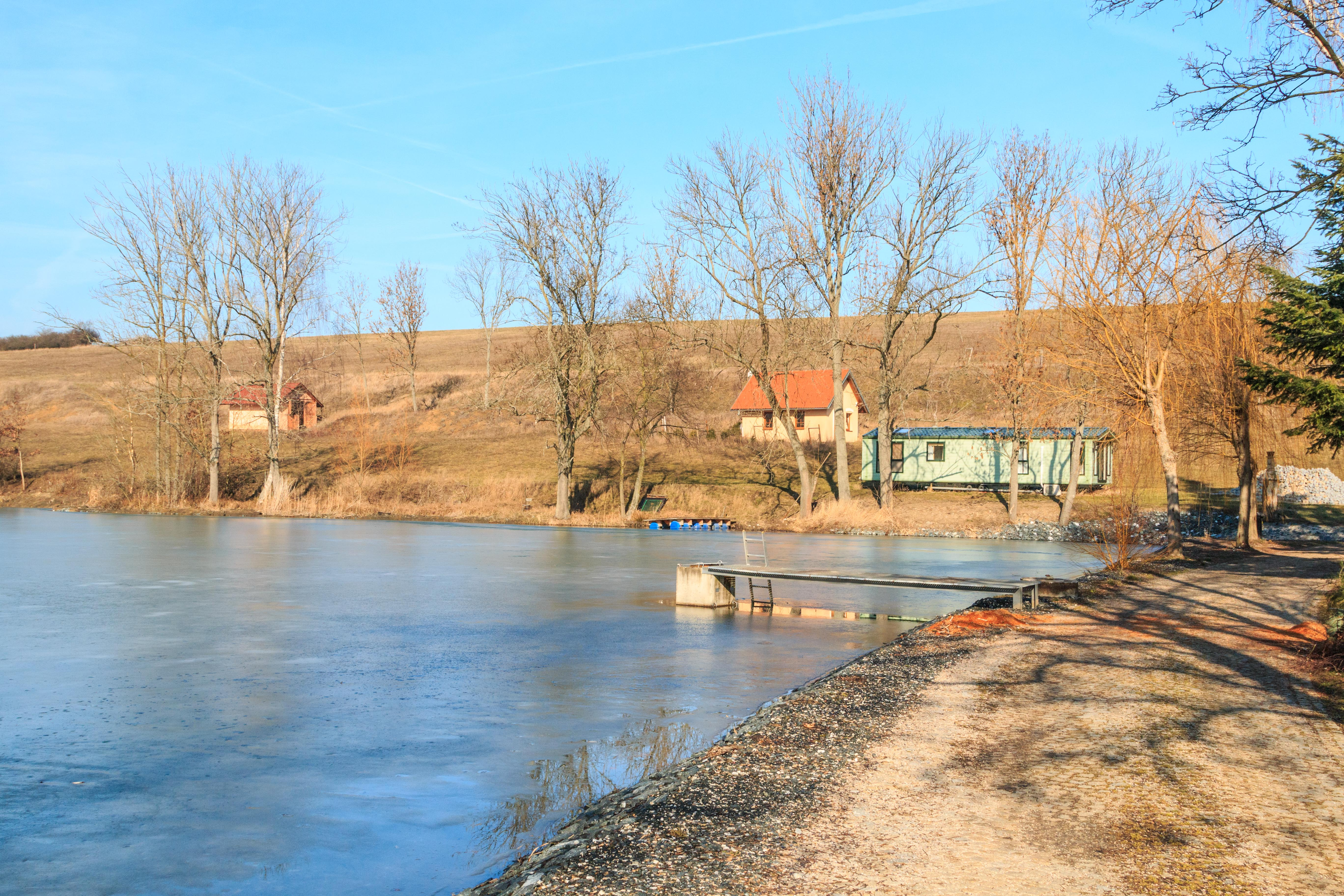 Rybník Prachovna u Seletic Project: Vodstvo. Ticket: 1711.